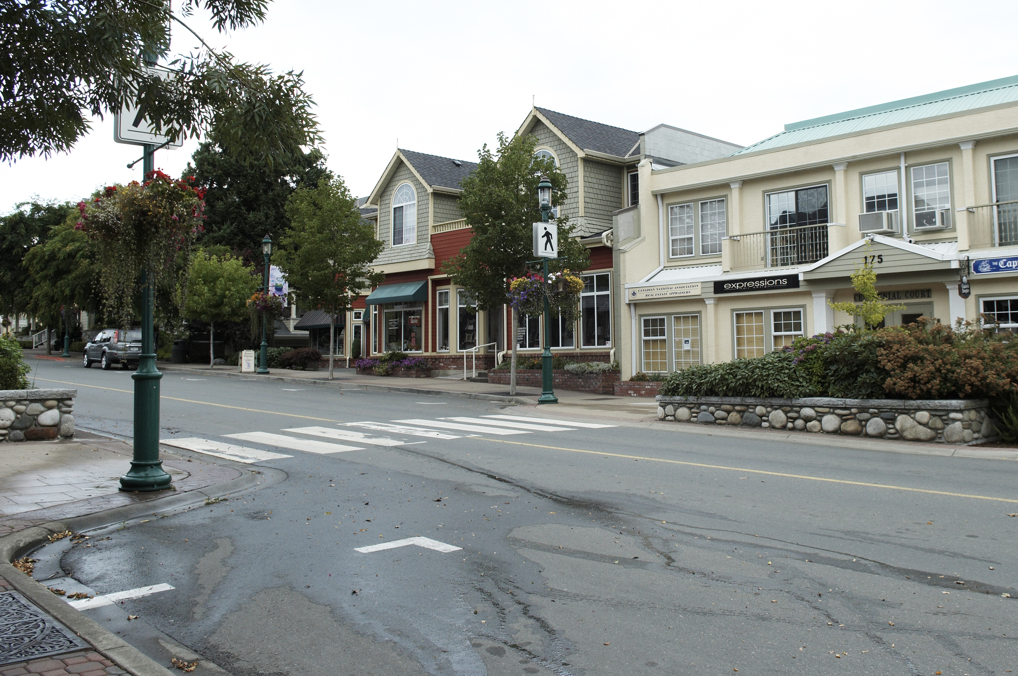 Pictures courtesy of Town of Qualicum Beach